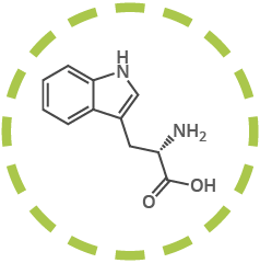 Estructura Molecular del aminoácido esencial Triptófano